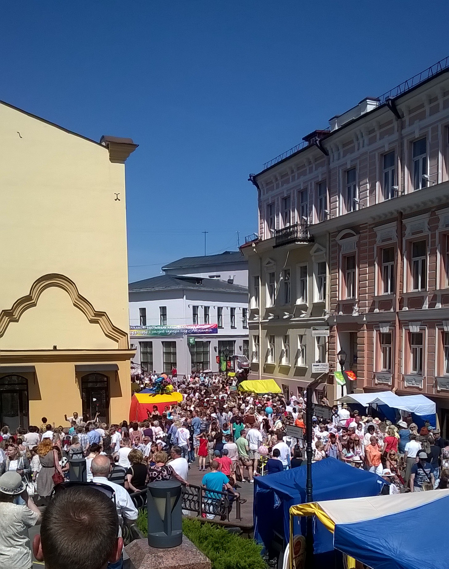 Цыганскі (рома) падворак XI Рэспубліканскага фестывалю нацыянальных культур у Гродна.